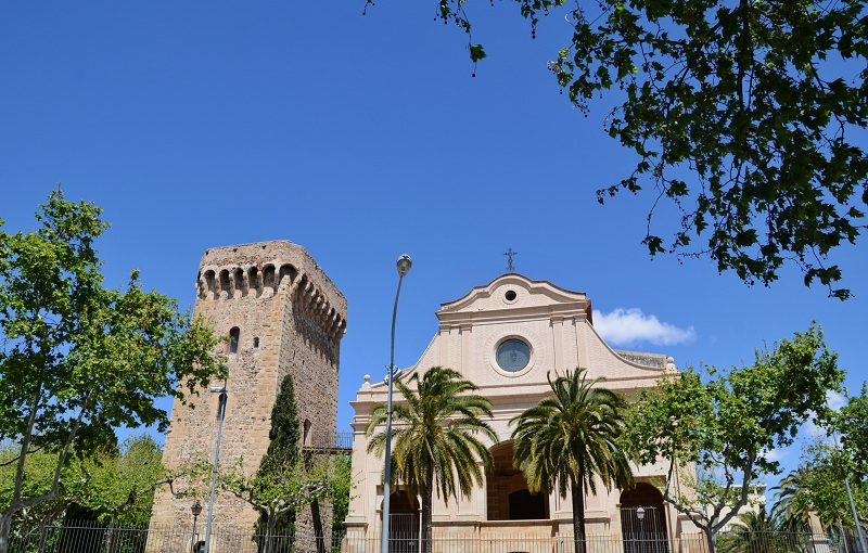 Torre del santuari del Camí (Cambrils)